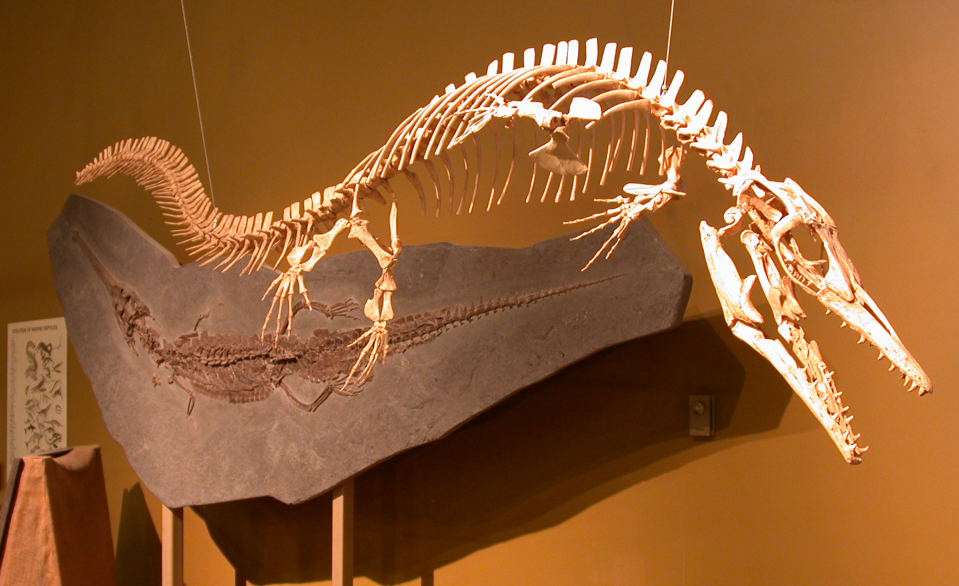 Halisaurus mosasaur, Wyoming Dinosaur Center, Thermopolis / 2006